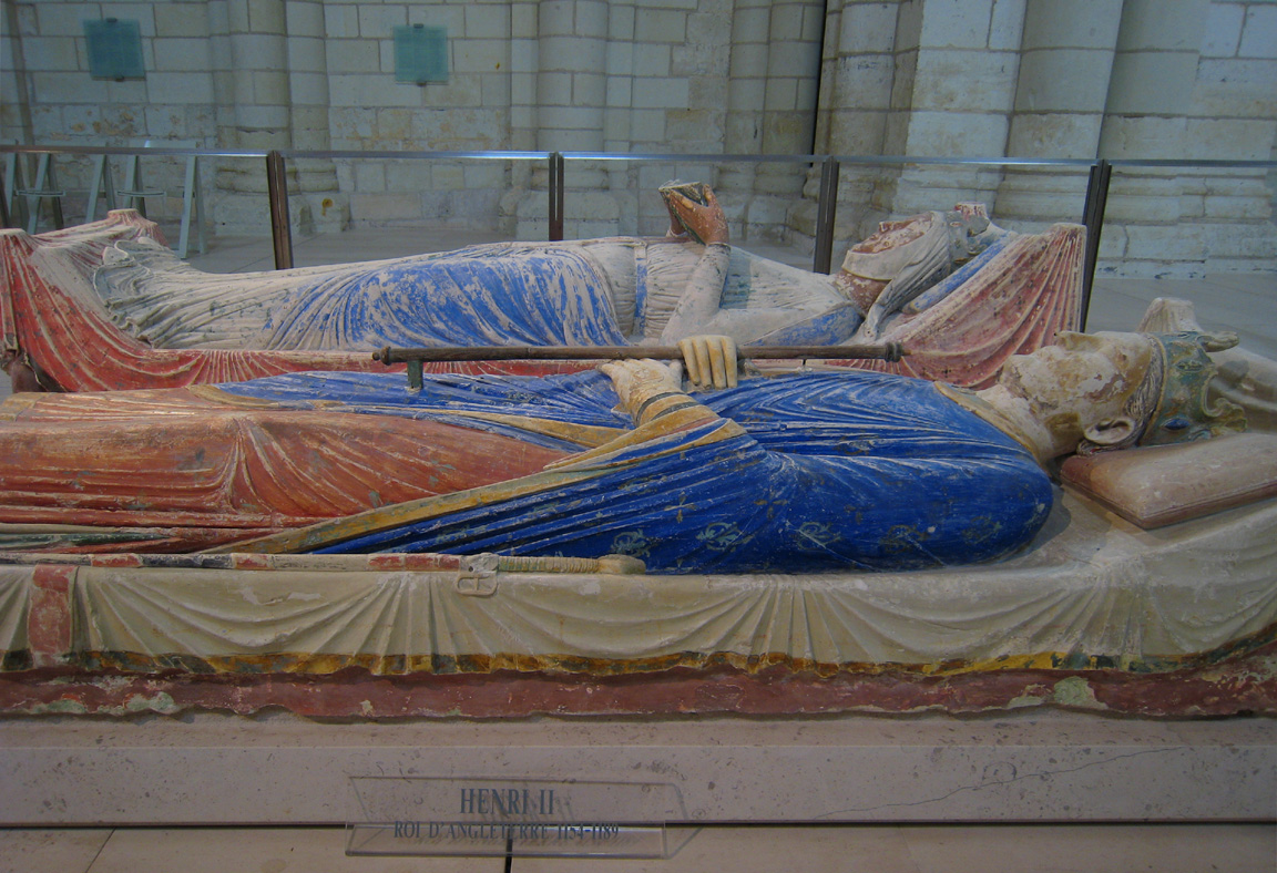 Abbaye de Fontevraud, France. Gisants d'Henri II d'Angleterre, dît Plantagenêt, Roi d'Angleterre, et son épouse, au second plan, Aliénor d'Aquitaine, une bible entre les mains.